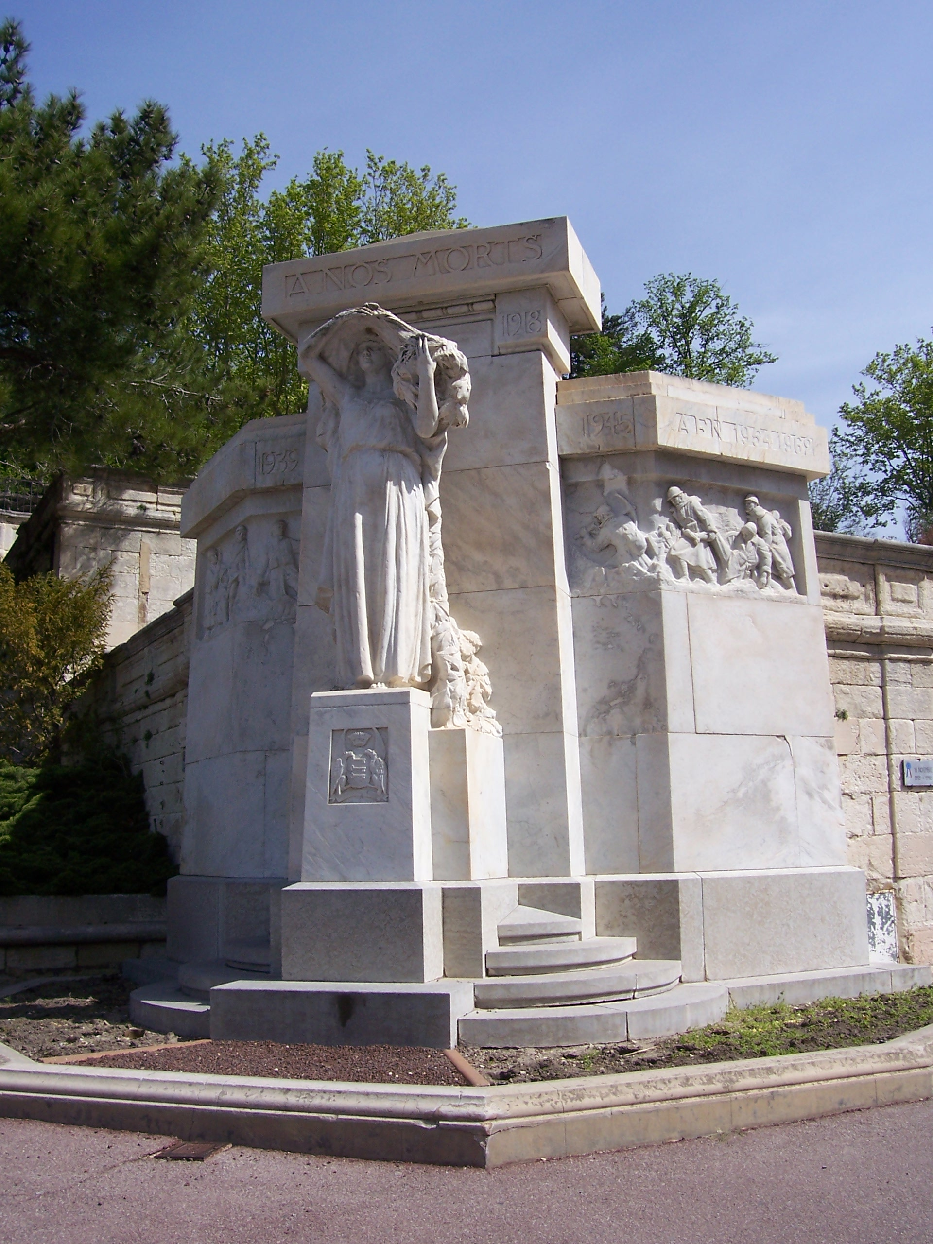 Monument aux morts d'Avignon sur le rocher des Doms